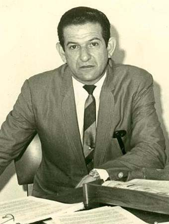 Armando Rodríguez